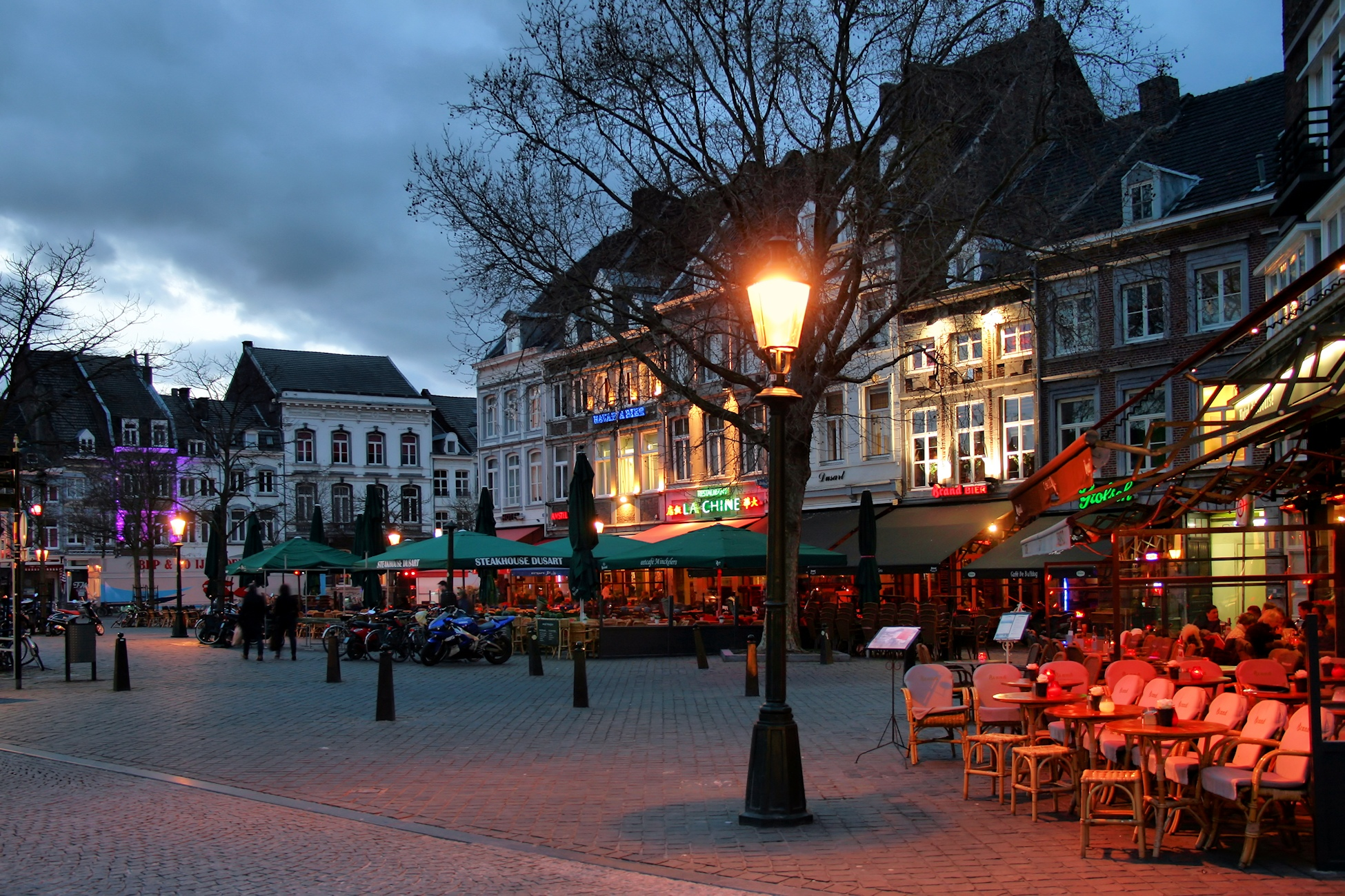 Markt